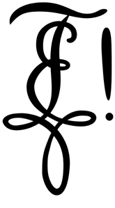 Großer Burschenschafterzirkel (auch: Zirkel der Braunschweiger Burschenschaft Germania)